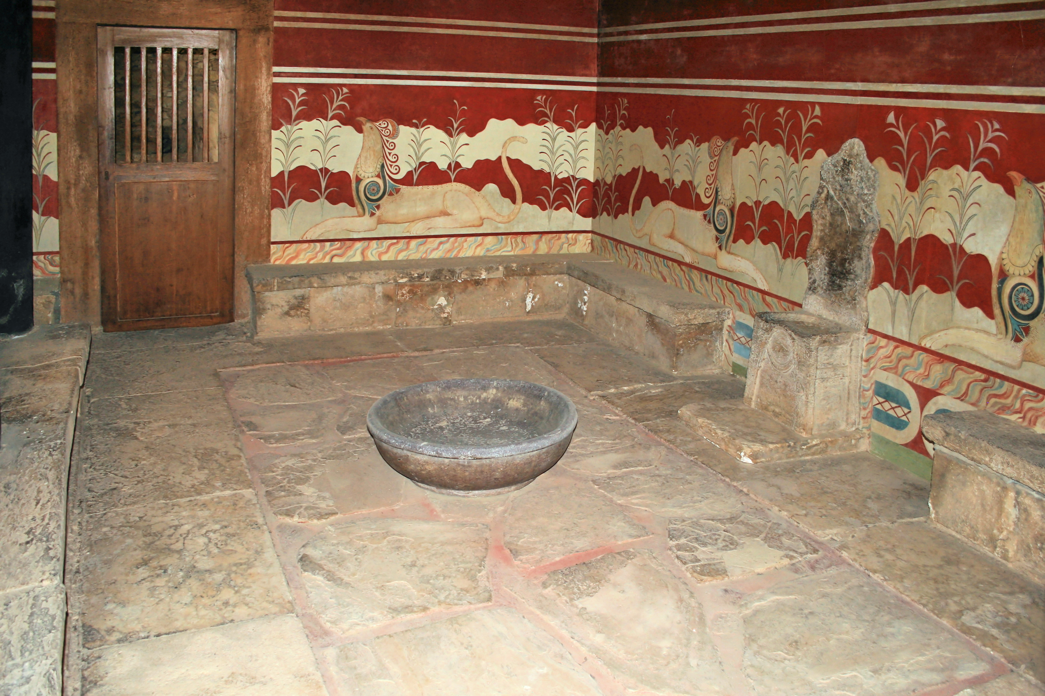 Der Thronsaal mit dem Greifenfresko im minoischen Palast von Knossos auf der griechischen Insel Kreta